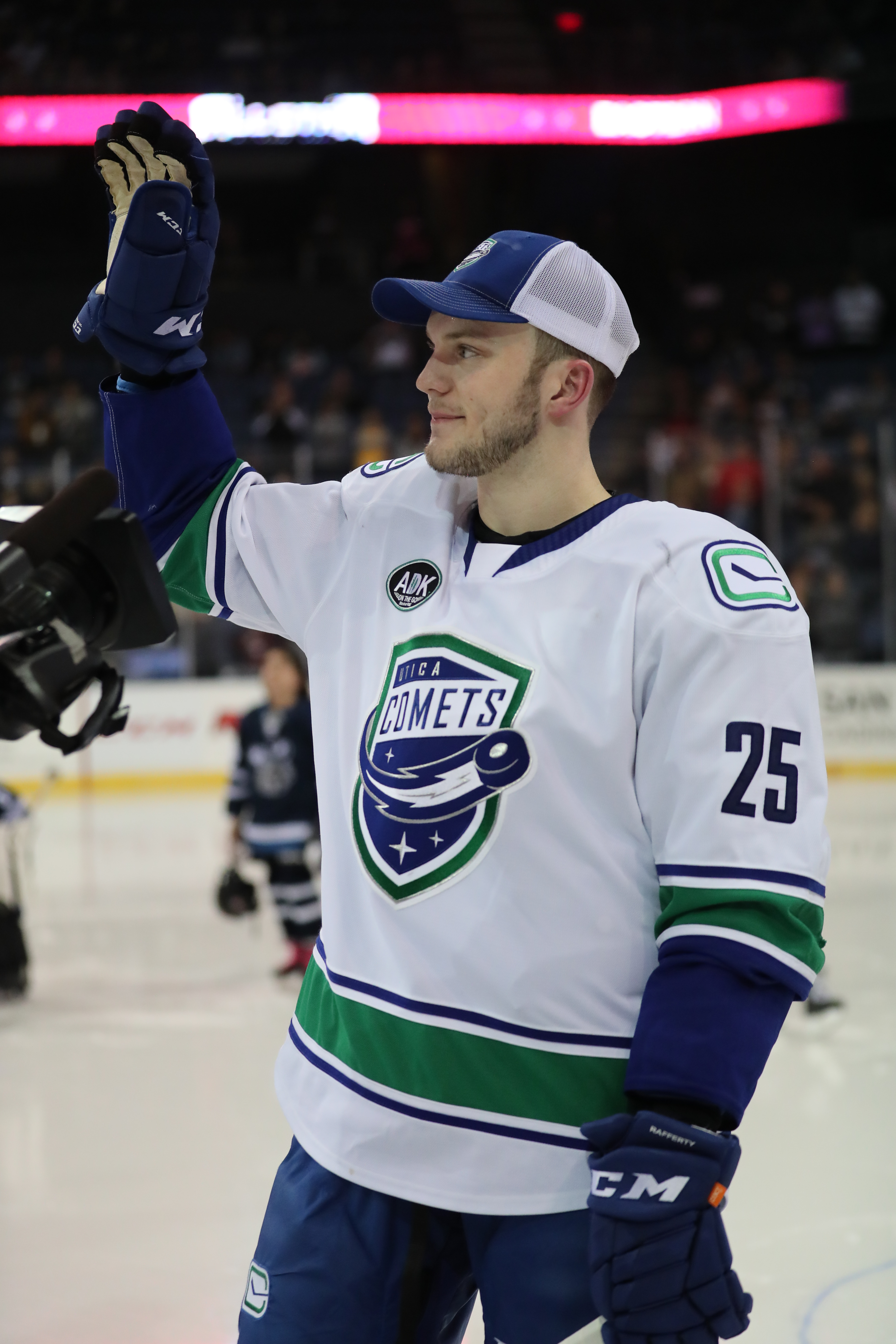 AA3I0808